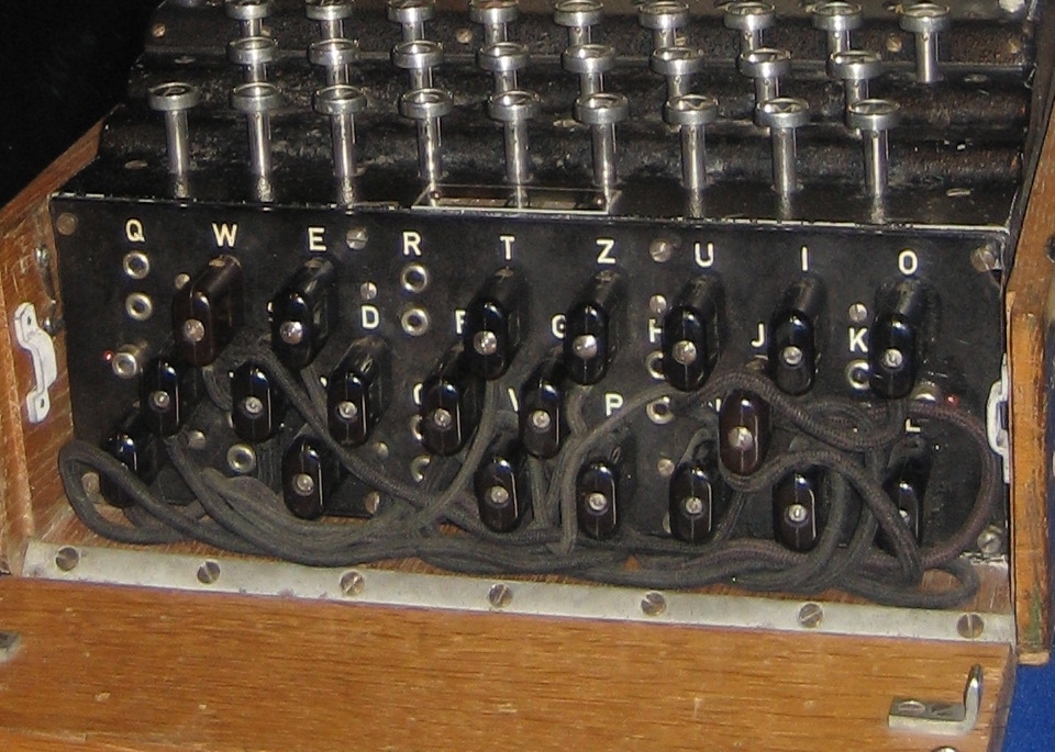 Steckerbrett